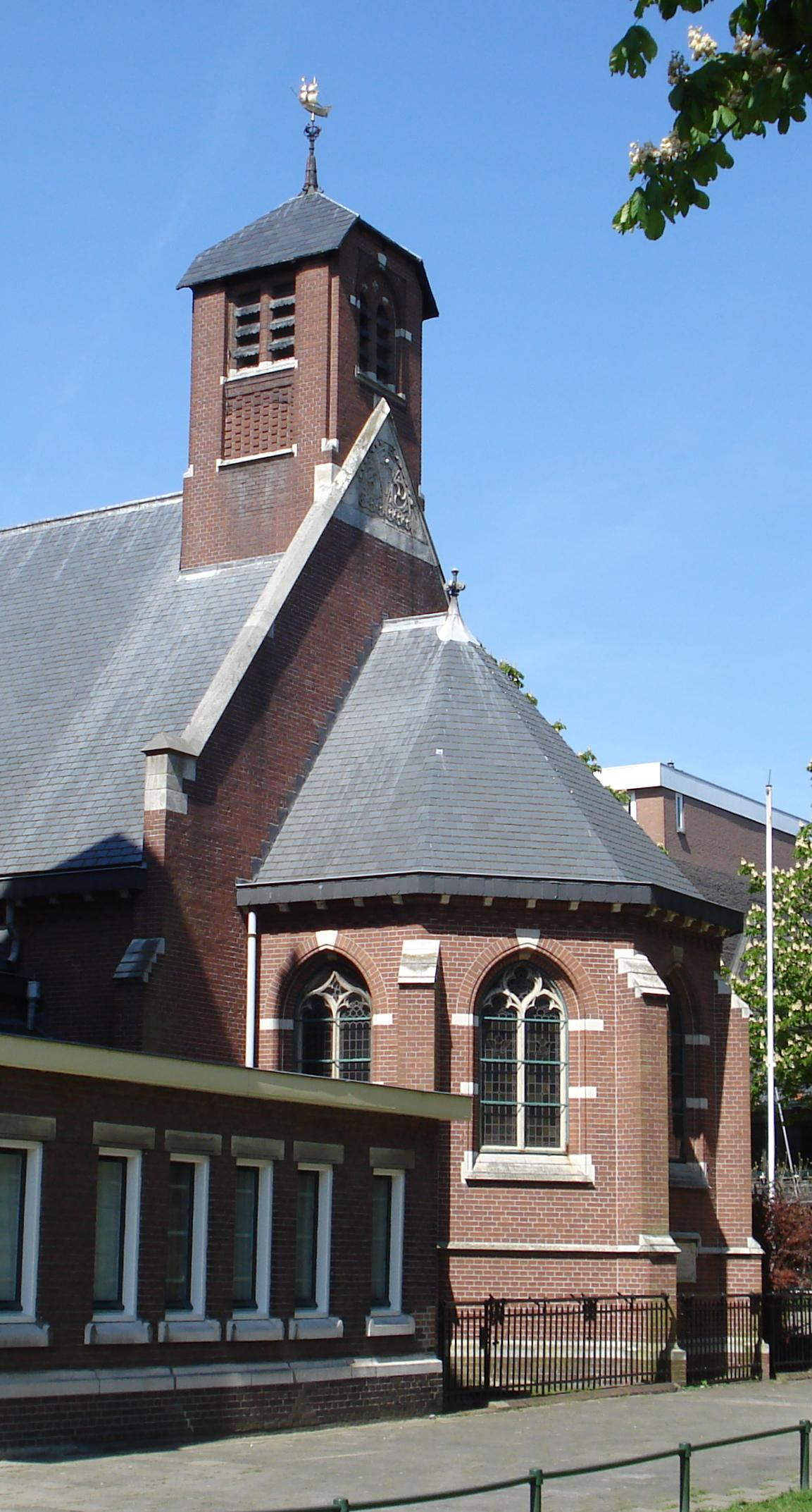 Rotterdam, Pieter de Hoochstraat. St Mary's Church. Architect Jan Verheul.